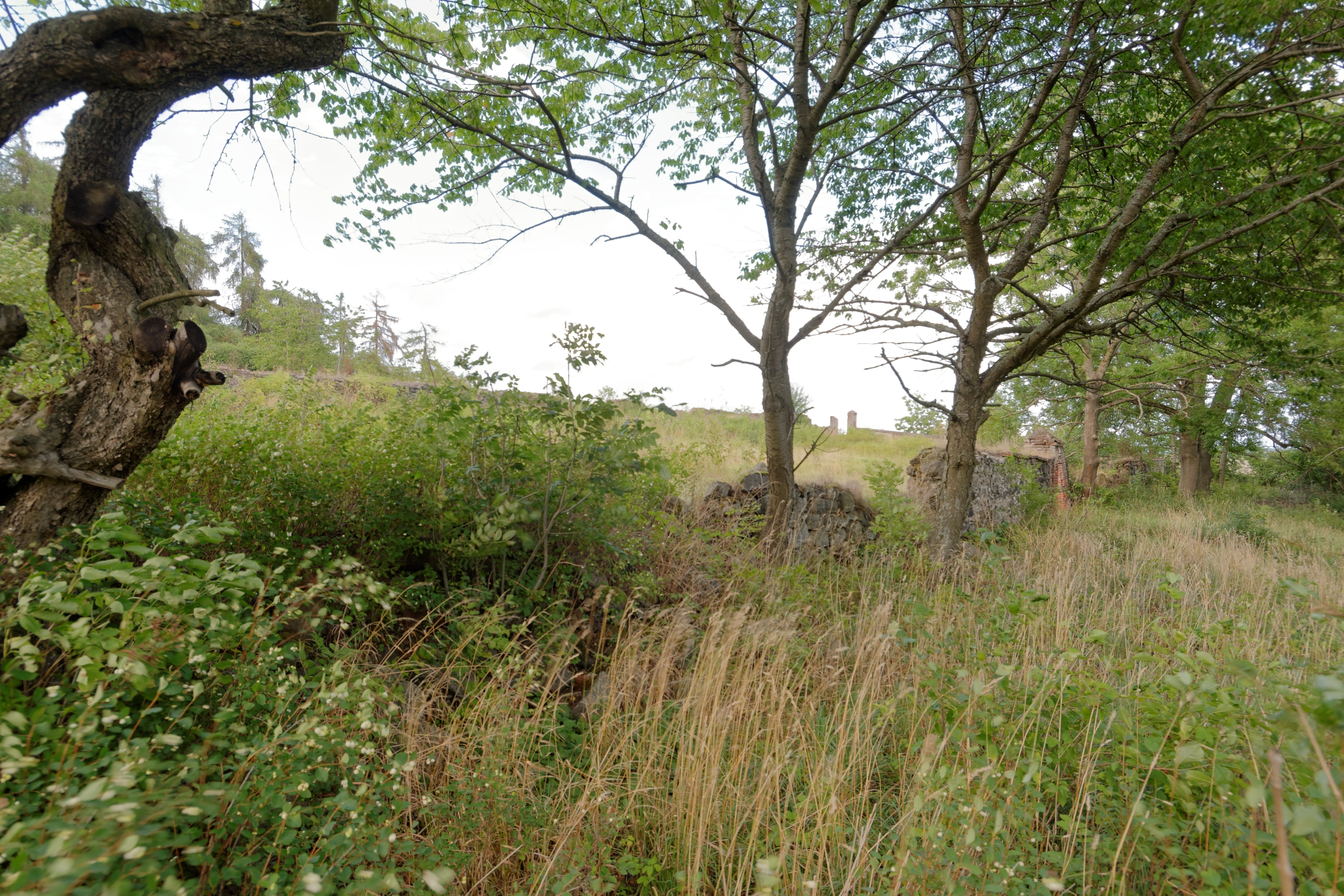 Židovský hřbitov v Lukách